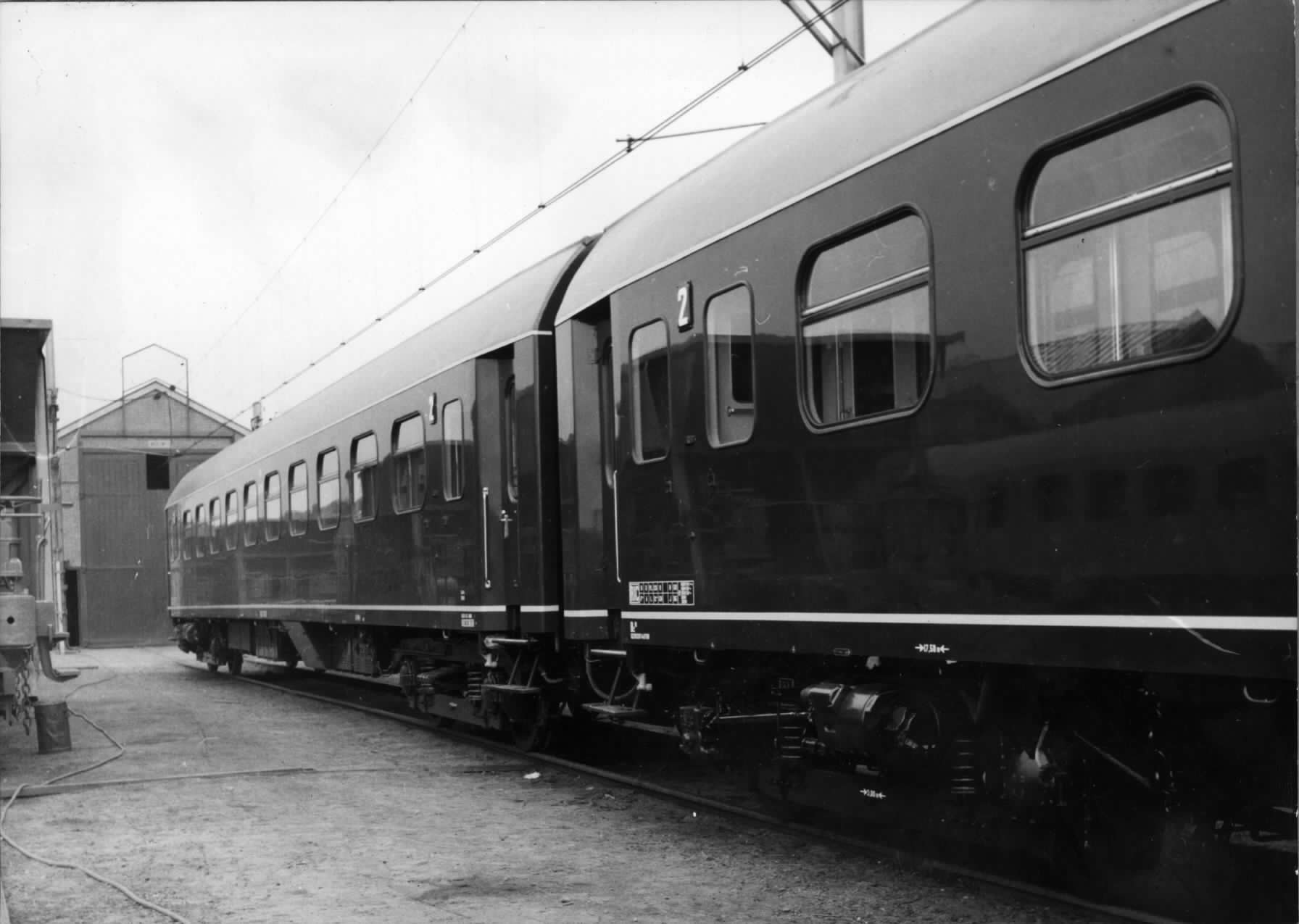 Afbeelding van twee ligrijtuigen uit de serie NS B 7001-7025 (plan N) van de N.S. op het terrein van Werkspoor te Utrecht. Het Utrechts Archief - Catalogusnummer 152115